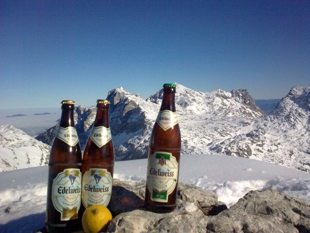 Edelweiss Weisbier vor einem Bergpanorama - dem Markenimage entsprechend